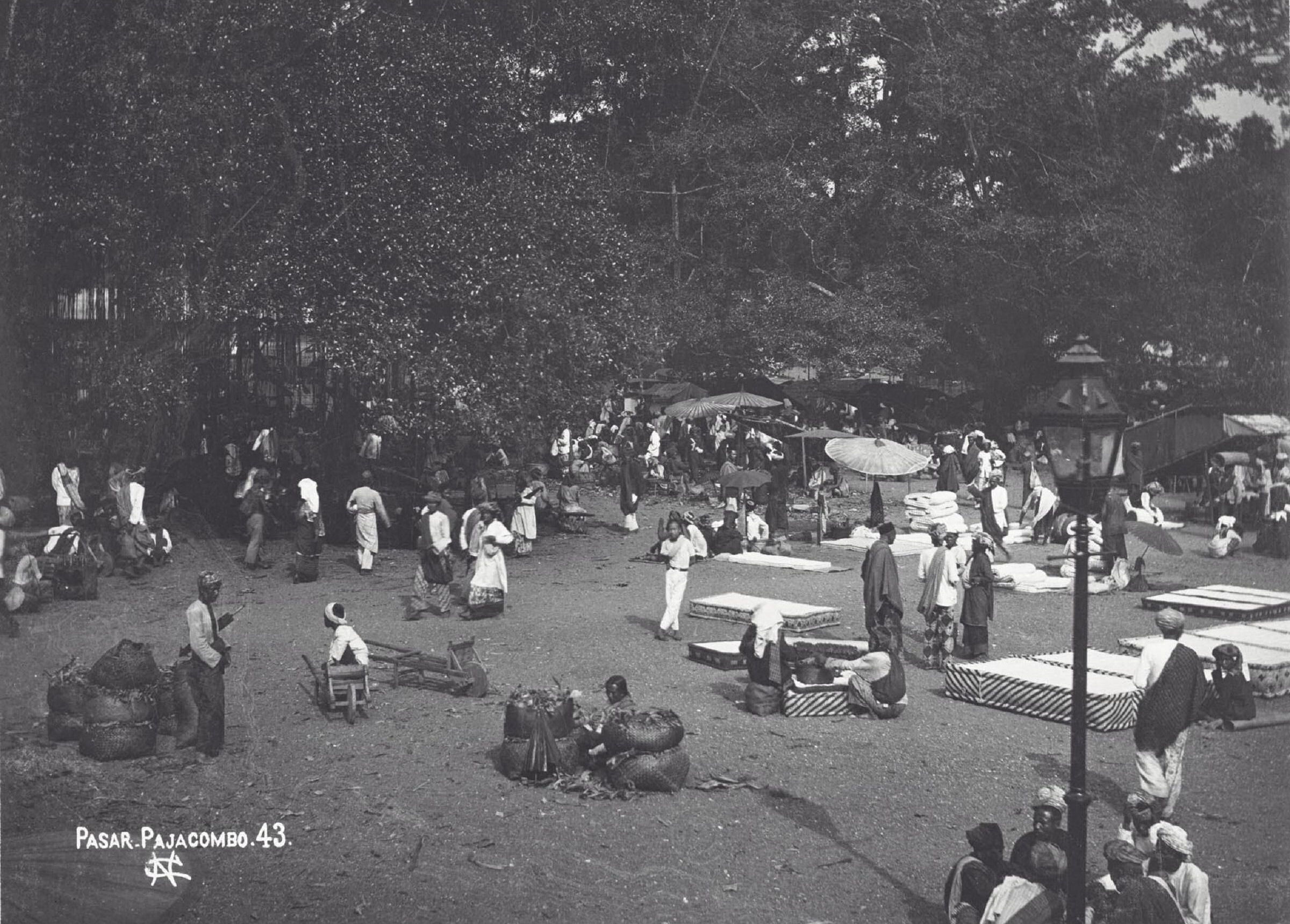 Payakumbuh market circa 1900.